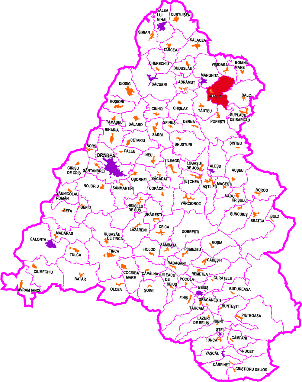 Ovi D. Pop /